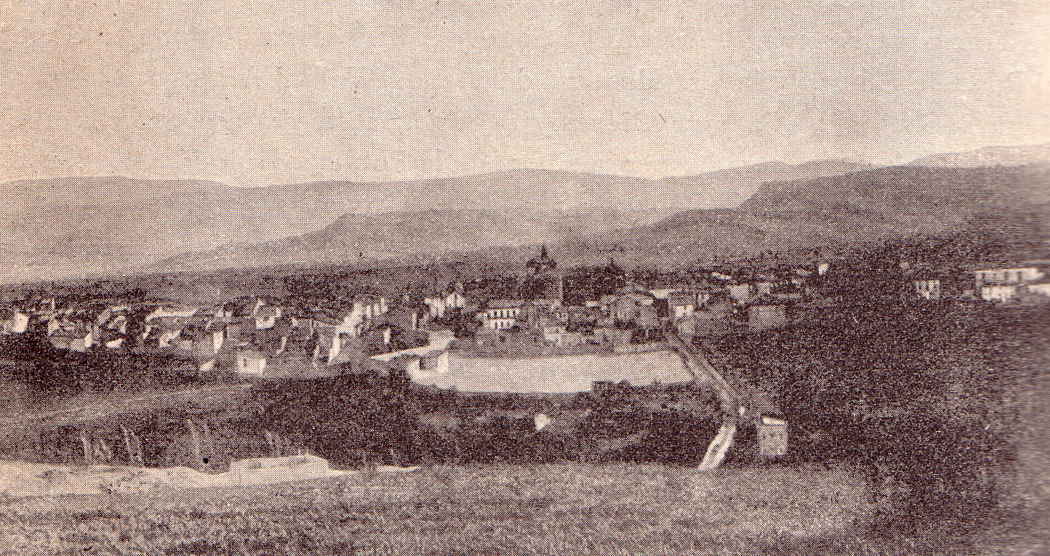 Fotografia de Tremp del 1900 publicada en un llibre editat aquell any (Pallars Jussà)